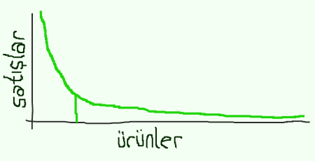 Y ekseninde satışlar X ekeseninde ürünler bulunan bu tipik Uzun Kuyruk grafiği çok çeşitli ürünlerin toplam satışının çok tutan bir ürünün satışından daha fazla olmasını ifade ediyor. Bu grafik ilk defa 'da yayınlanmıştır. Kaynak